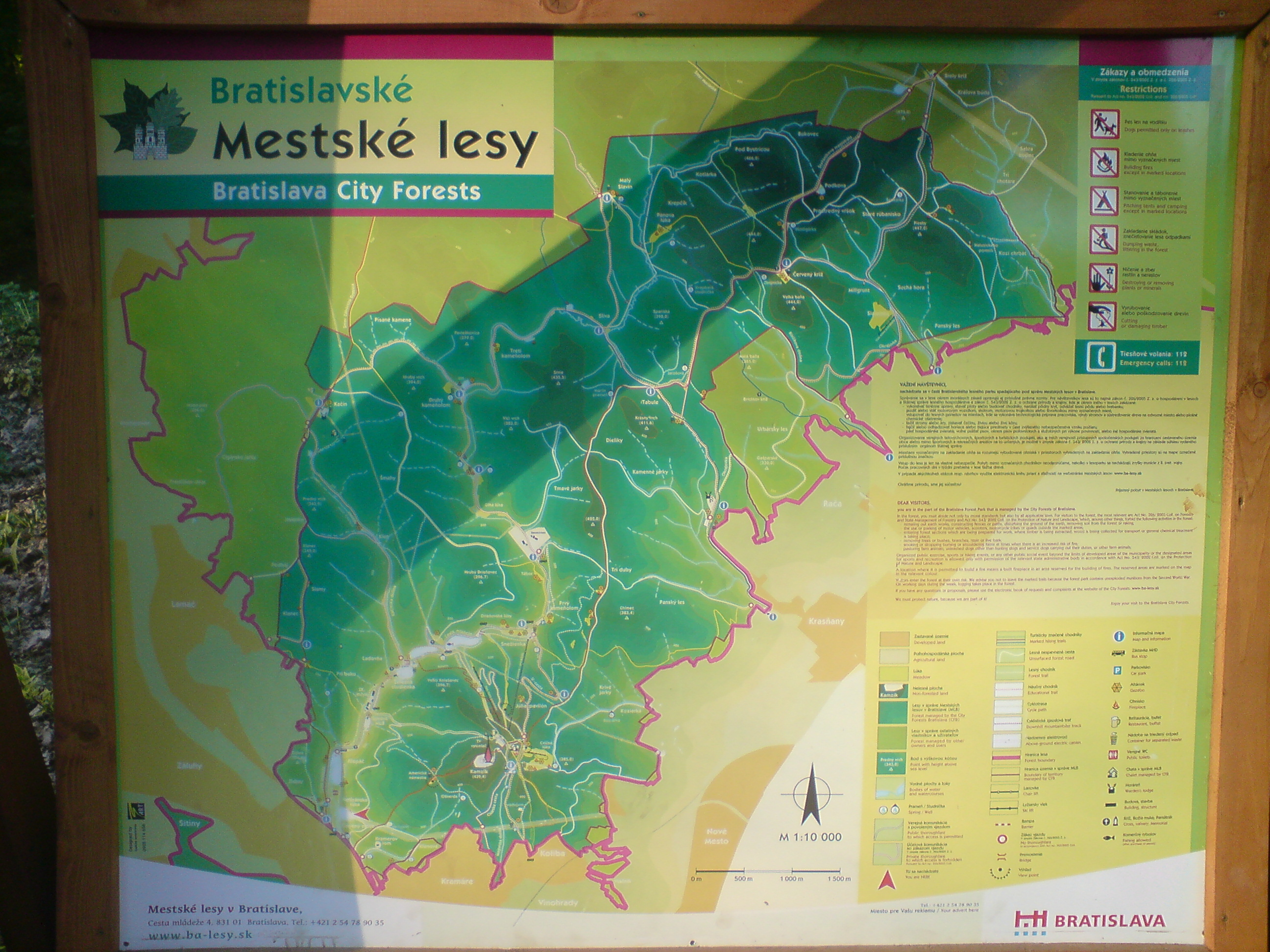 Bratislavský lesný park.